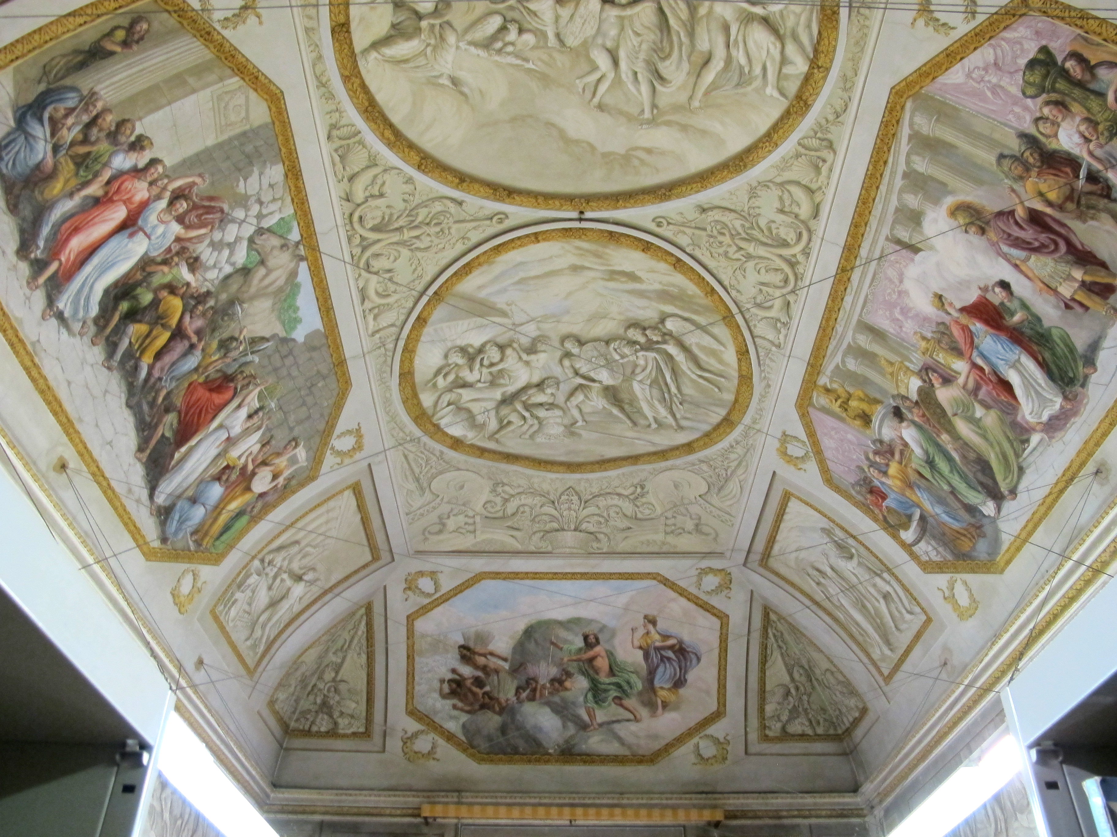 Palazzo di San Clemente, Firenze